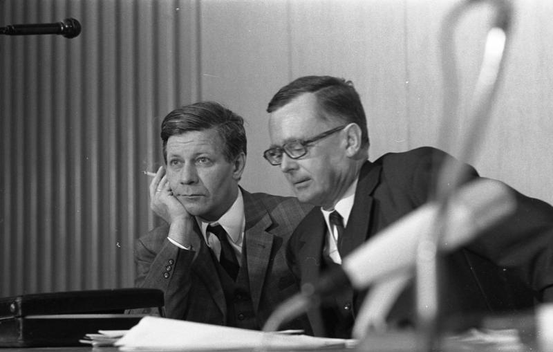 Pressekonferenz der SPD im Fraktionssaal der SPD (Bundeshaus)